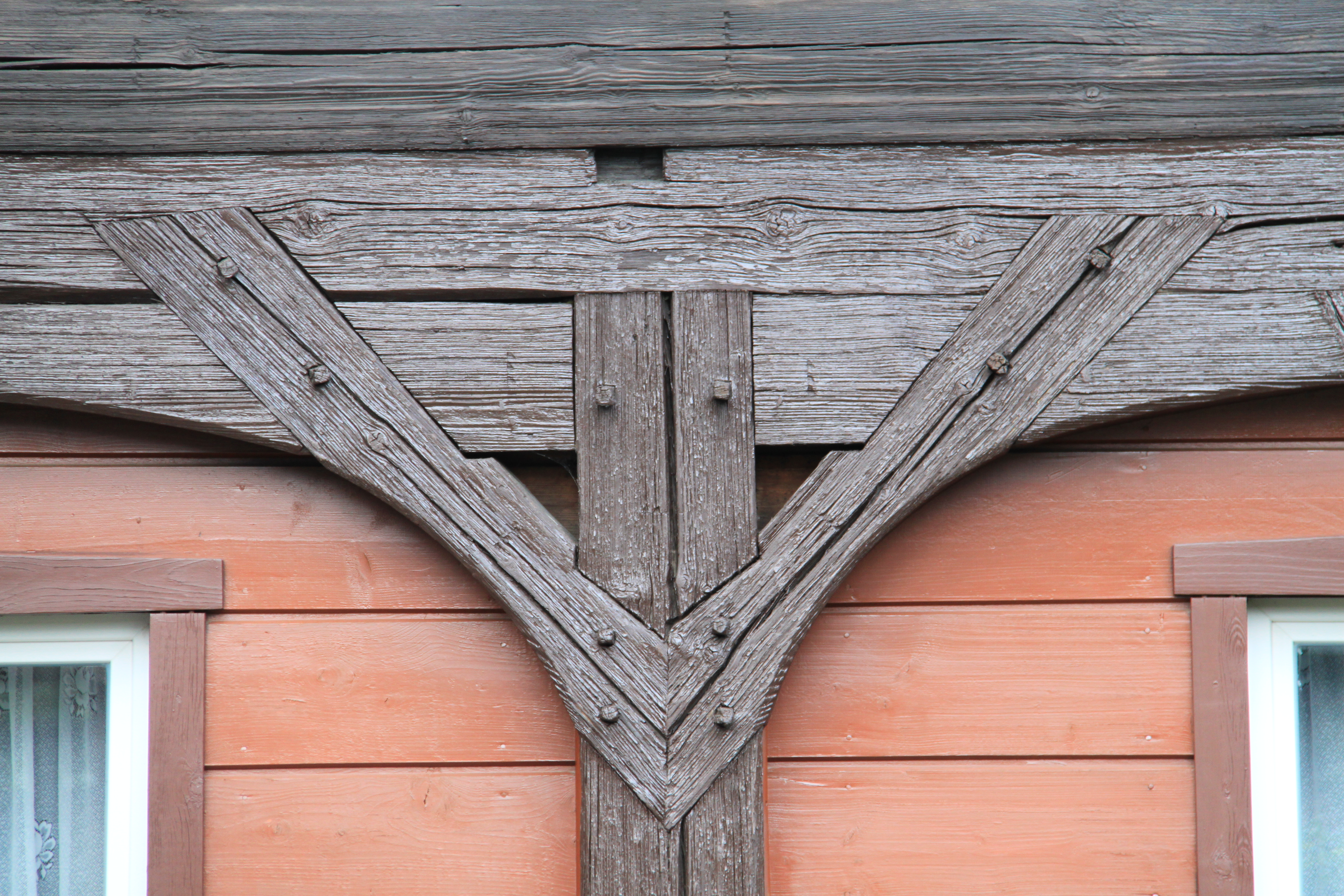 Impressionen Cunewalde (Landkreis Bautzen)